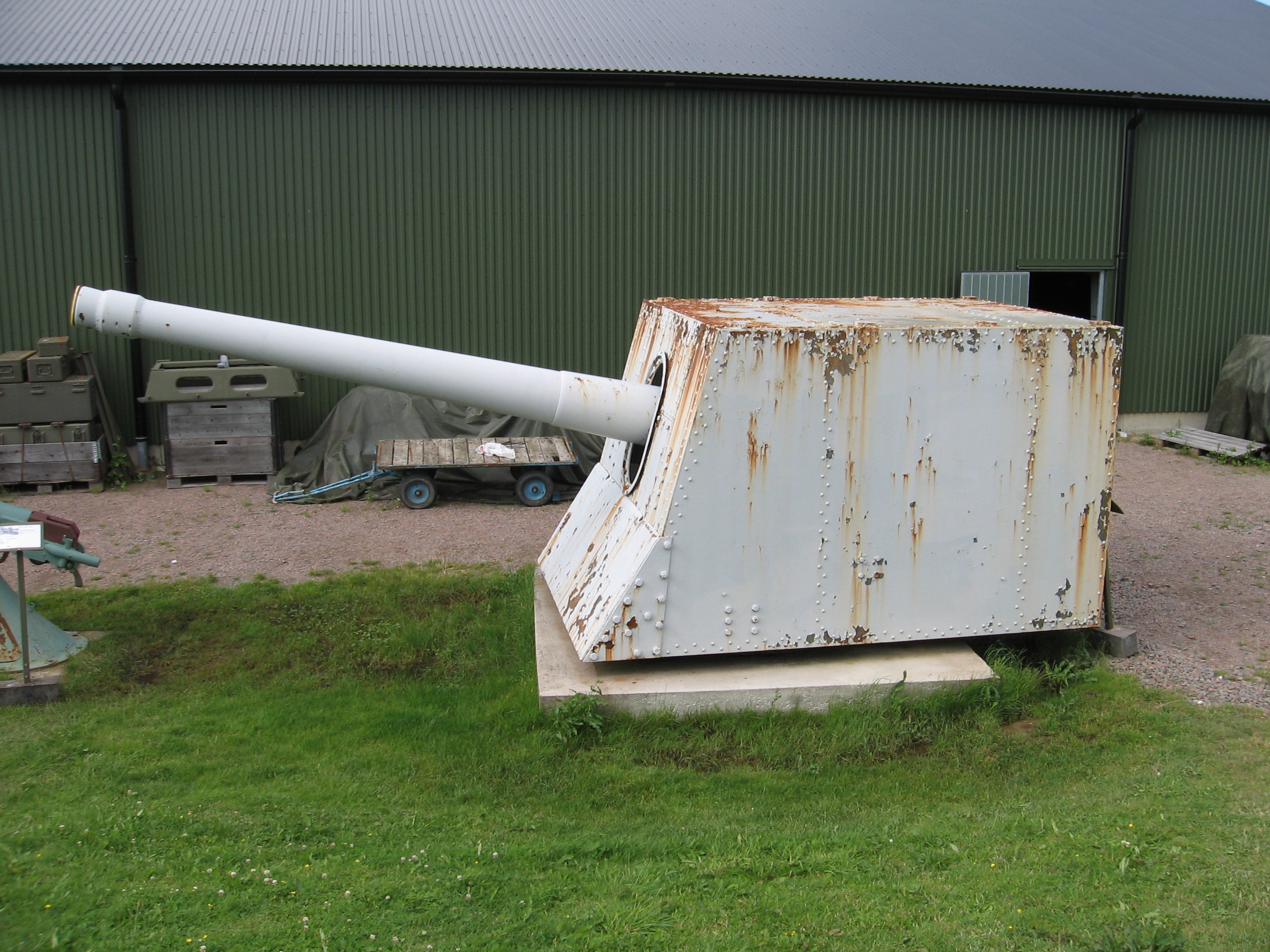 En f.d. Slagskeppskanon på Beredskapsmuseet i Djuramossa utanför Helsingborg.